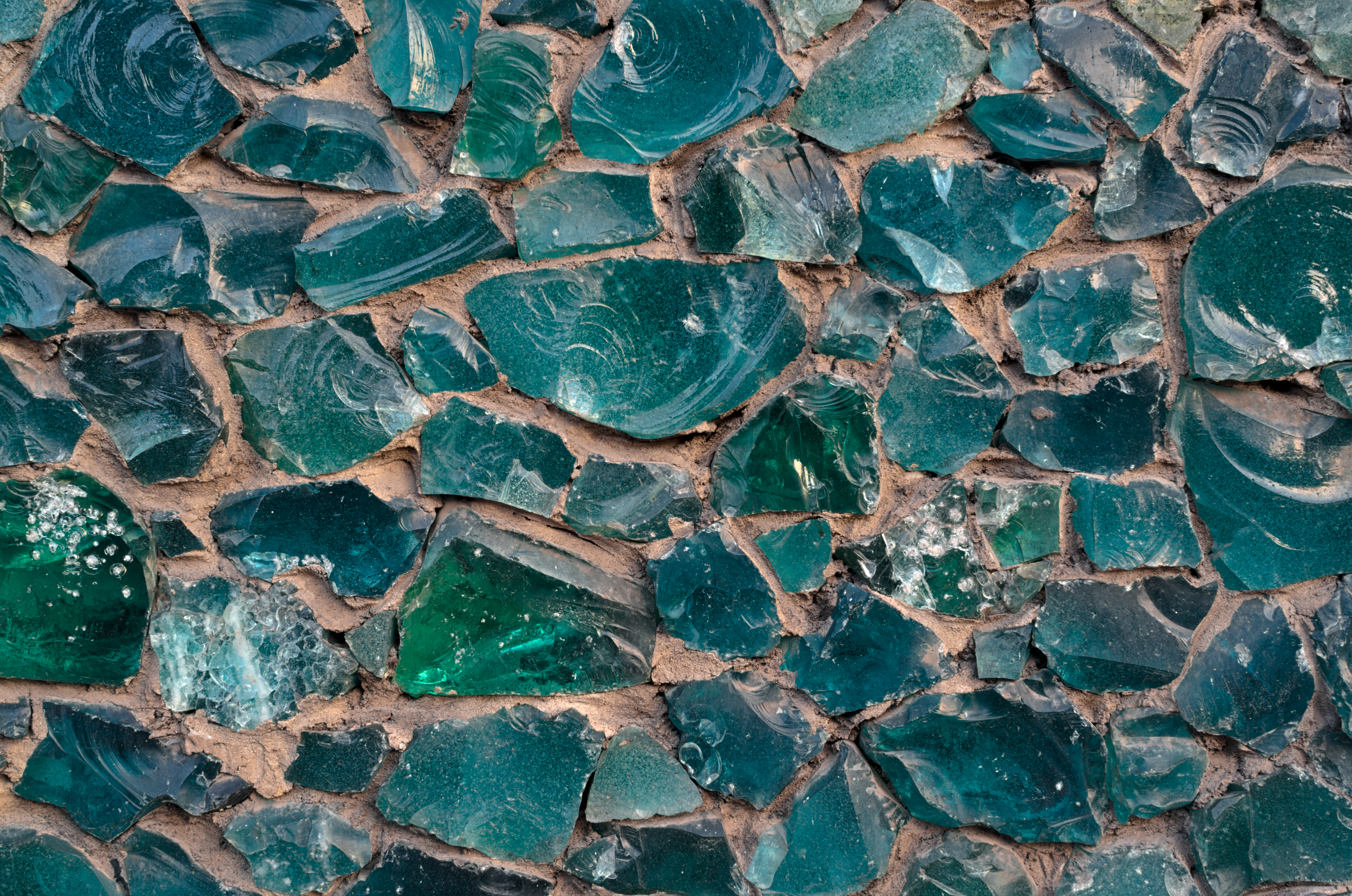 detal wschodniej elewacji Galerii Sztuki Współczesnej BWA, aleja Wojciecha Korfantego 6 w Katowicach, szkło z Huty Zawiercie jako dekoracja elewacji